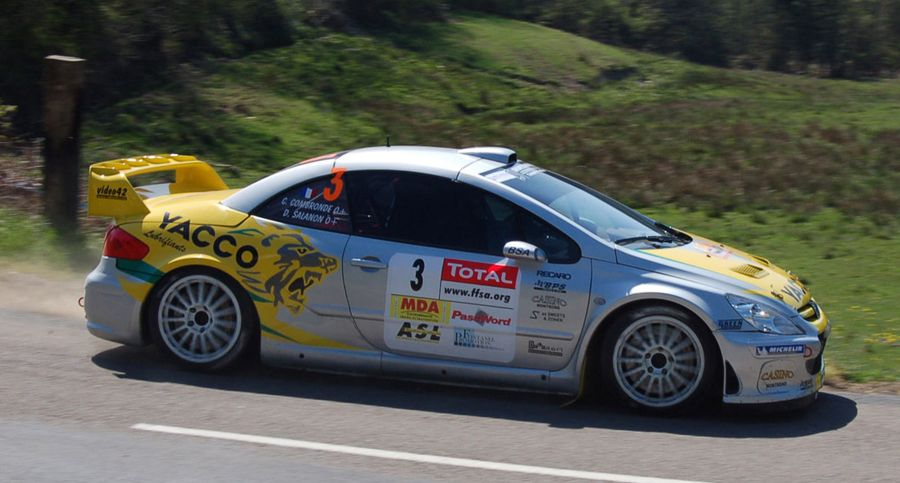 David Salanon au Rallye Lyon-Charbonnière en 2007